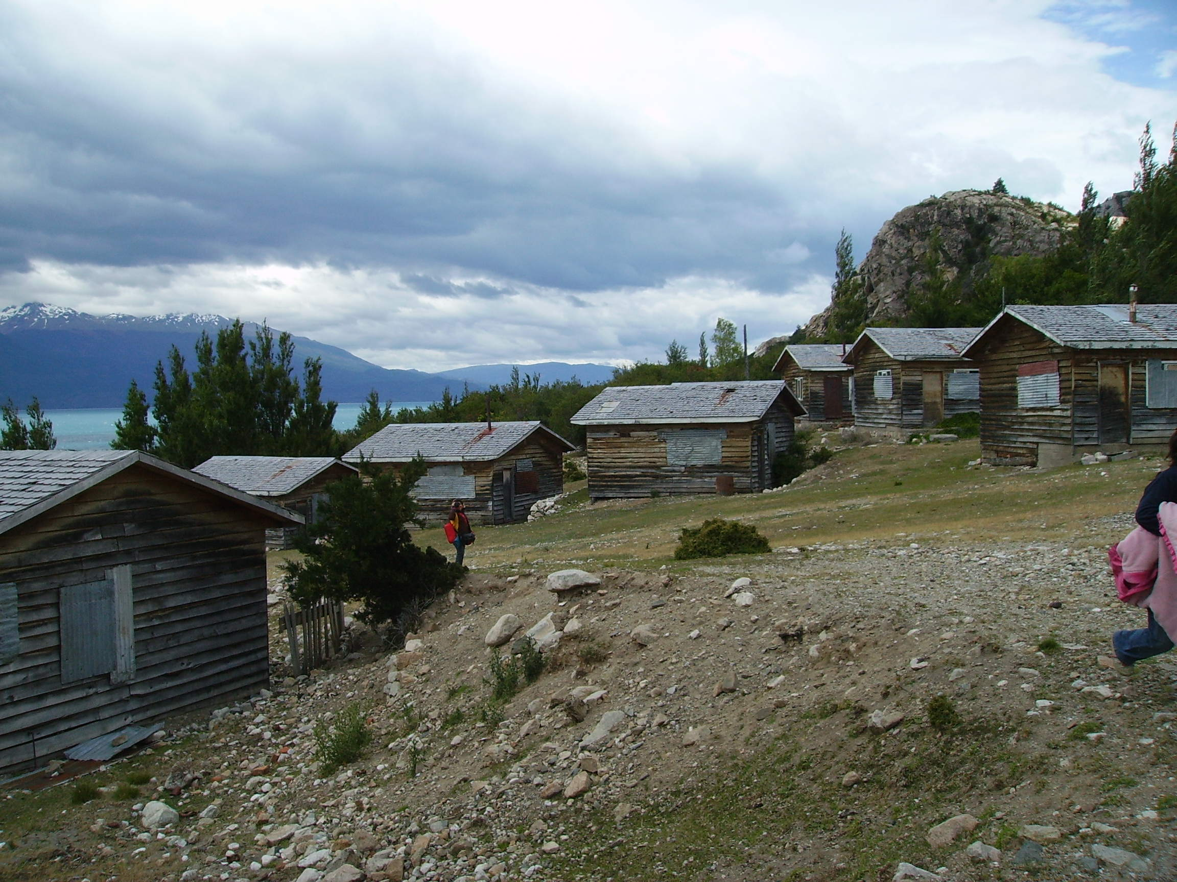 Campamento minero Puerto Cristal This is a photo of a national monument in Chile: 2035